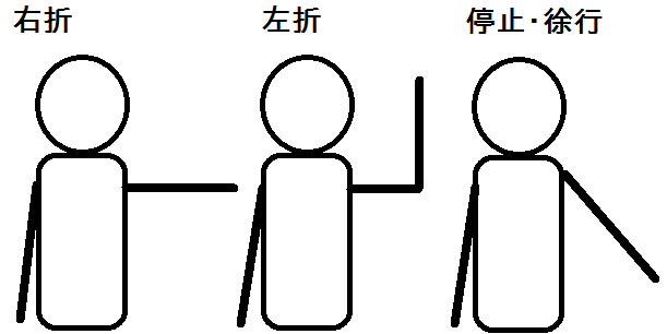 日本の道路交通法における自転車および自動車運転時における方向指示器の代替として使用される手信号の一例を後方から見た場合の模式図